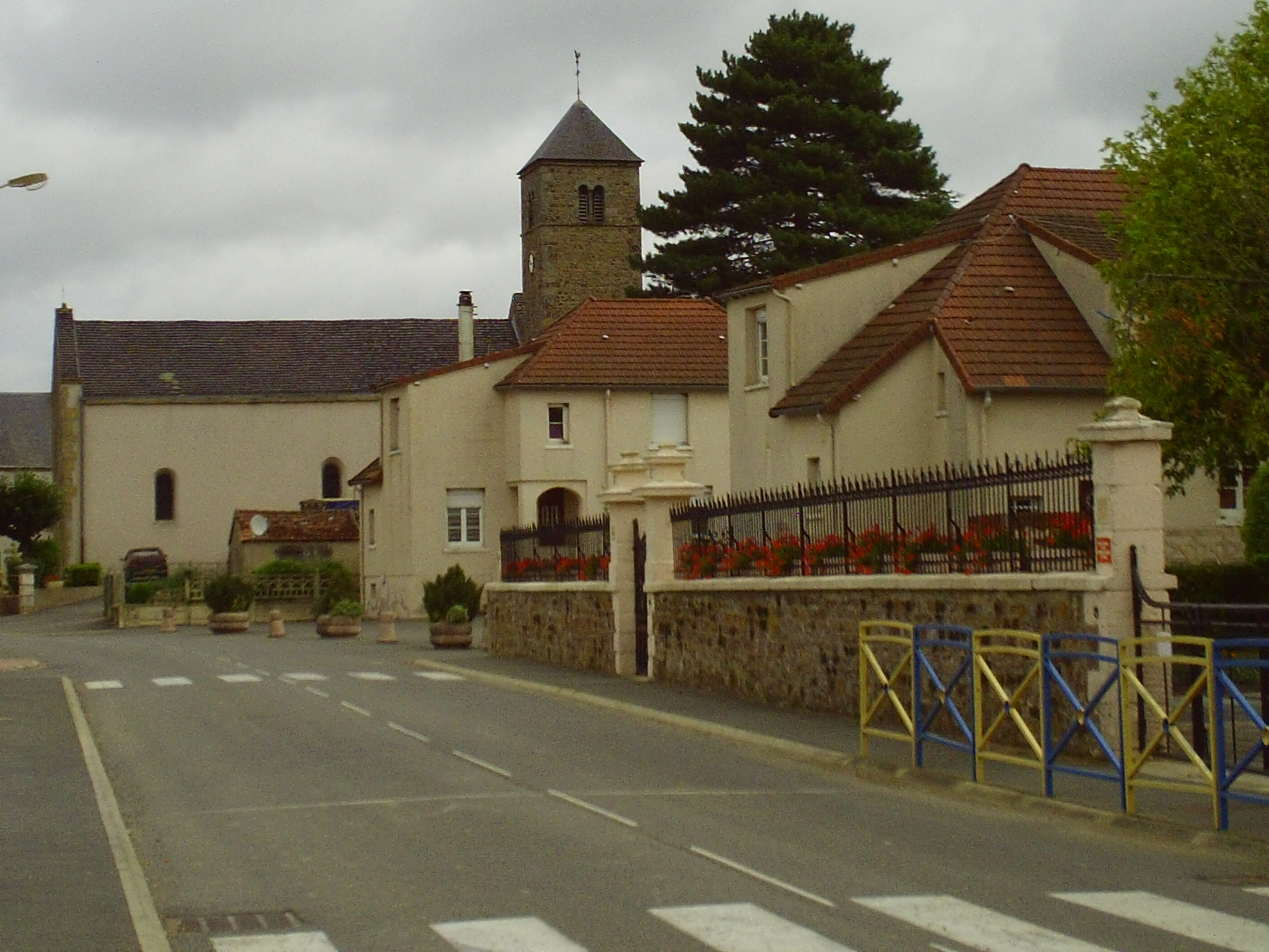 Commune de Chalmoux - Le Bourg